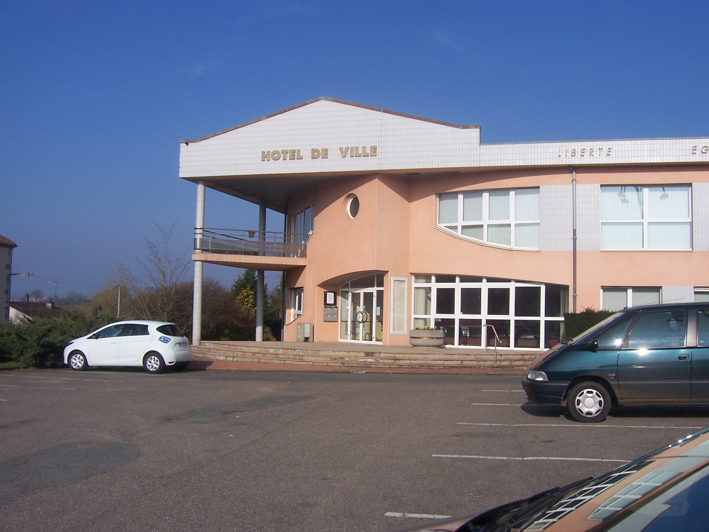 Mairie du Breuil